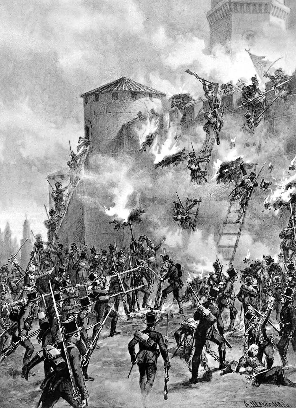 Взятии штурмом крепости Гянджи 3-го января 1804 года